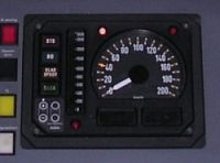 L'affichage en cabine de l'ATB-NG.